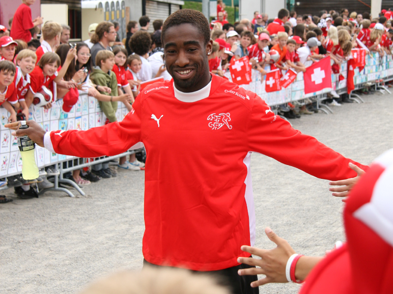 Johan Djourou im Trainingslager der Schweizer Fussballnationalmannschaft vor der Euro 2008